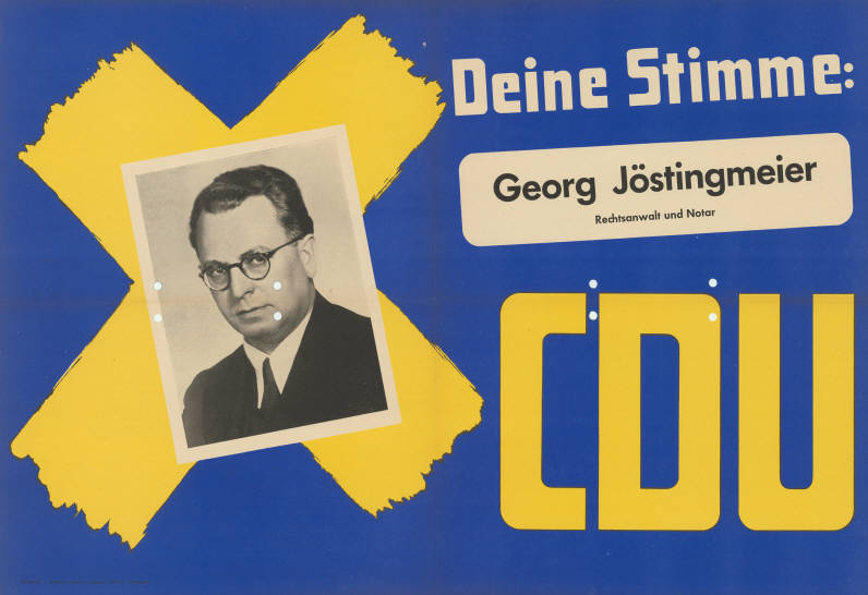 Deine Stimme: Georg Jöstingmeier Rechtsanwalt und Notar CDU Abbildung: Porträtfoto - Stimmkreuz Plakatart: Kandidaten-/Personenplakat mit Porträt Drucker_Druckart_Druckort: Bilddruck u. Klischee Lambert Lensing G.m.b.H., Dortmund Objekt-Signatur: 10-009 : 158 Bestand: Landtagswahlplakate Nordrhein-Westfalen (10-009) GliederungBestand10-18: Landtagswahlplakate Nordrhein-Westfalen (10-009) » Landtagswahl am 18.6.1950 » CDU » mit Porträtfoto Lizenz: KAS/ACDP 10-009 : 158 CC-BY-SA 3.0 DE